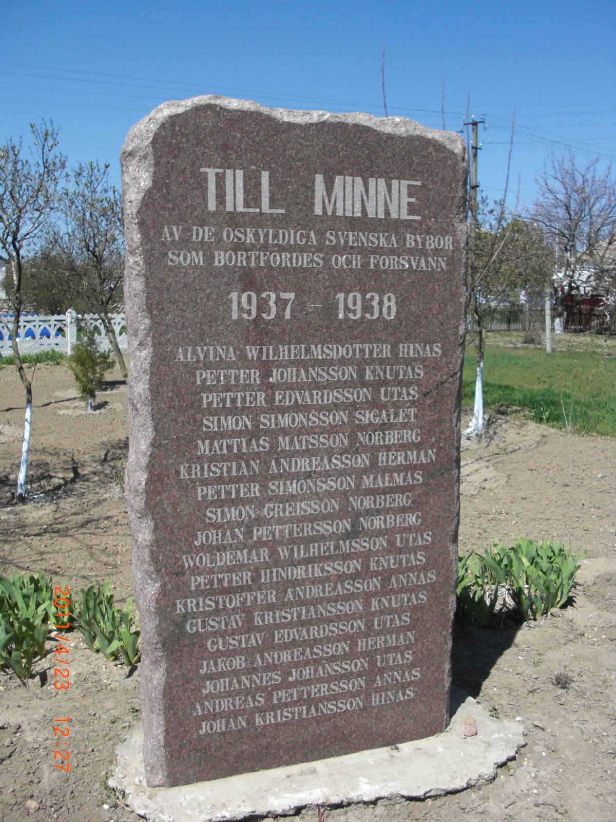 Minnesmäke över orsbor som dog i Stalins terror Time on picture is European (Berlin) not local time